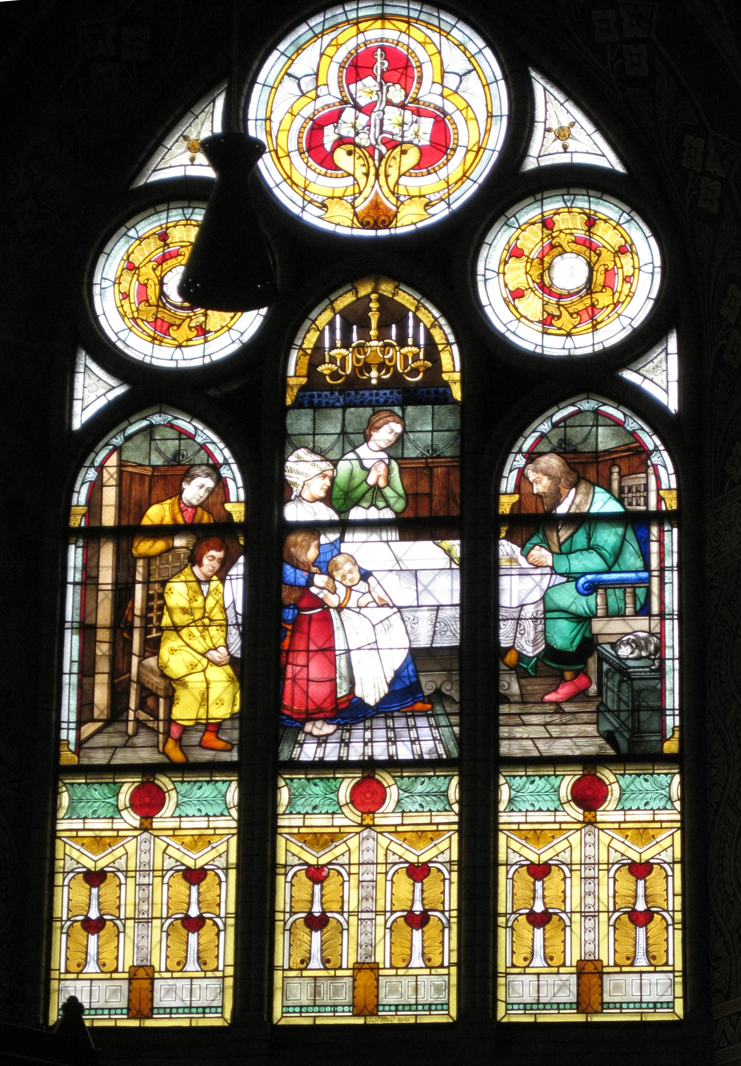 Altenburg, ev. Brüderkirche, Glasfenster zum christlichen Leben in der Familie: „Hausandacht“, Entwurf: Paul Gathemann